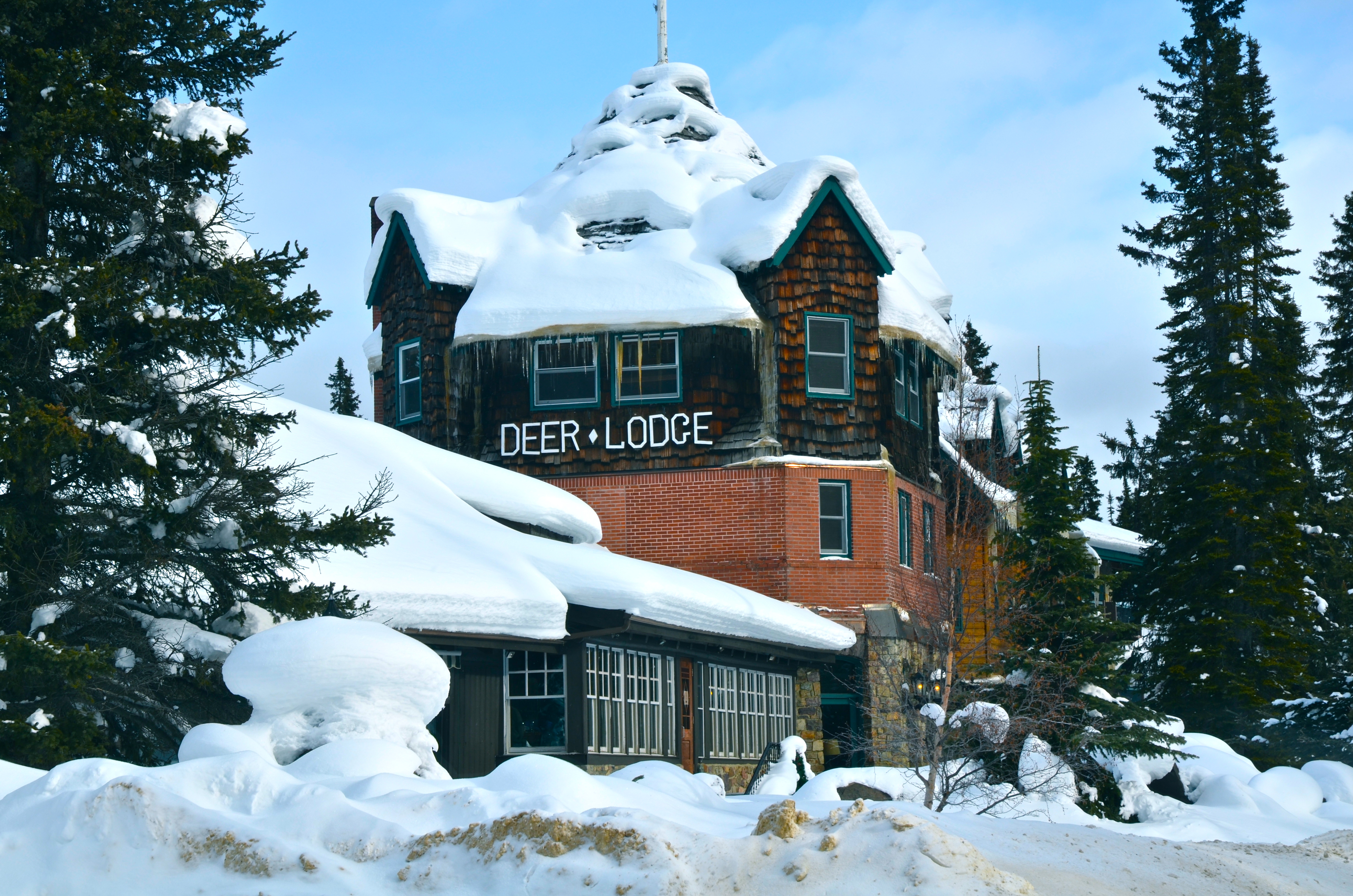 Deer Lodge - Lake Louise